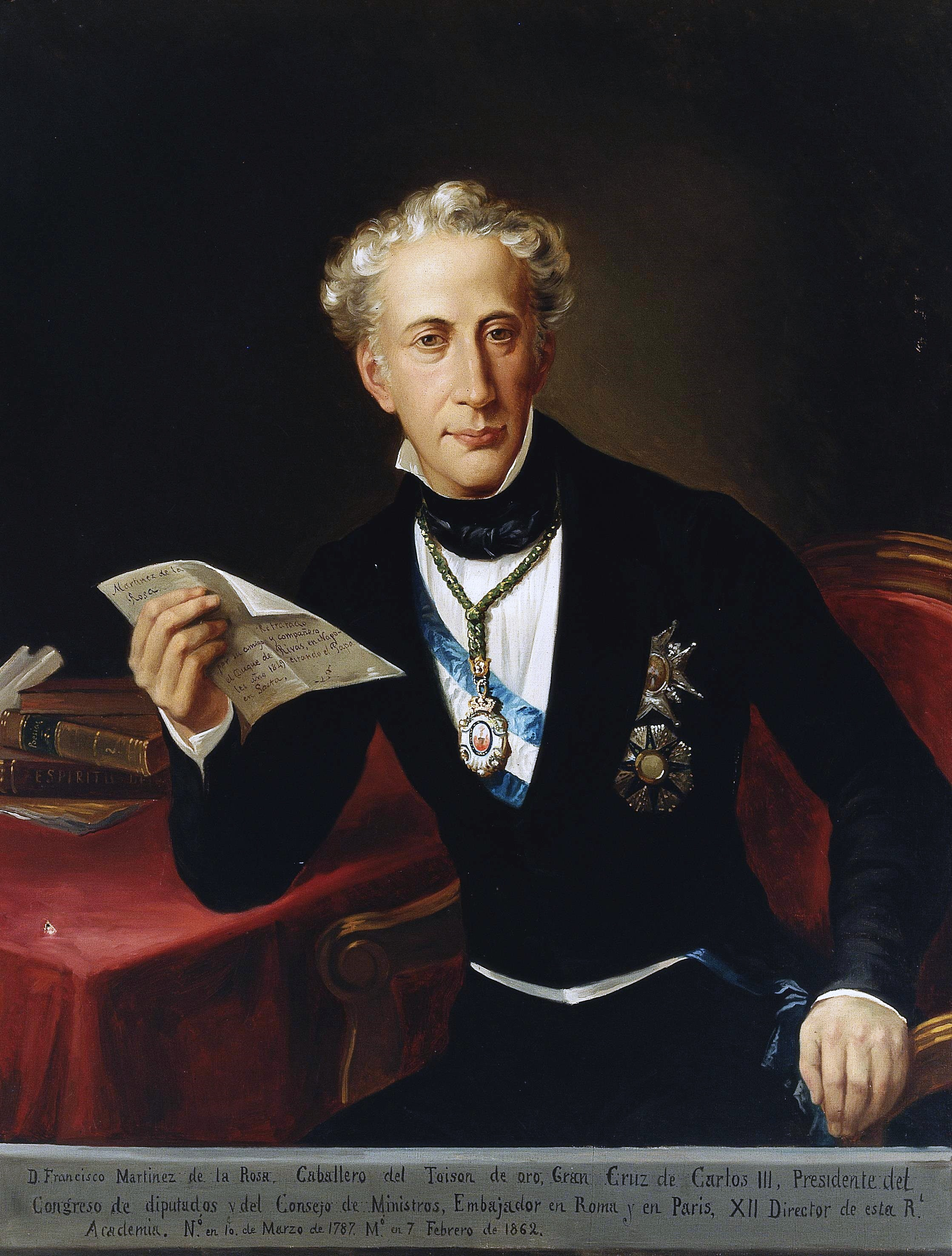 Retrato del poeta, dramaturgo, político y diplomático español Francisco Martínez de la Rosa (1787-1862).